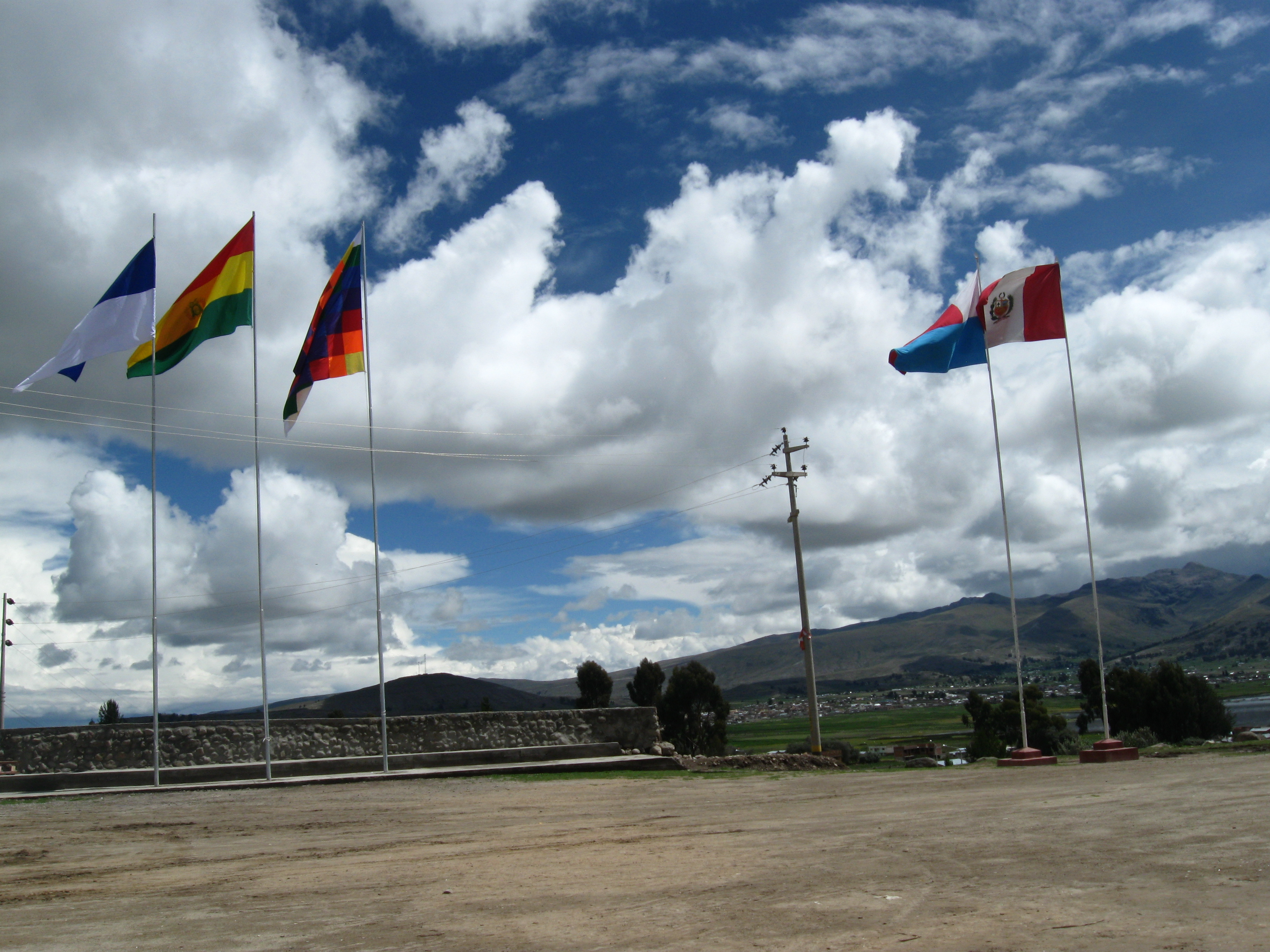 Cada cierto tiempo las banderas de Perú y Bolivia se izan juntas en el patio de la iglesia de Kasani como gesto de hermandad. La bandera peruana es izada por una autoridad boliviana y viceversa, la bandera boliviana es izada por una autoridad peruana